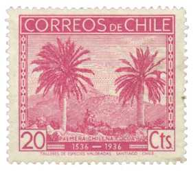 Timbre représentant jubaea